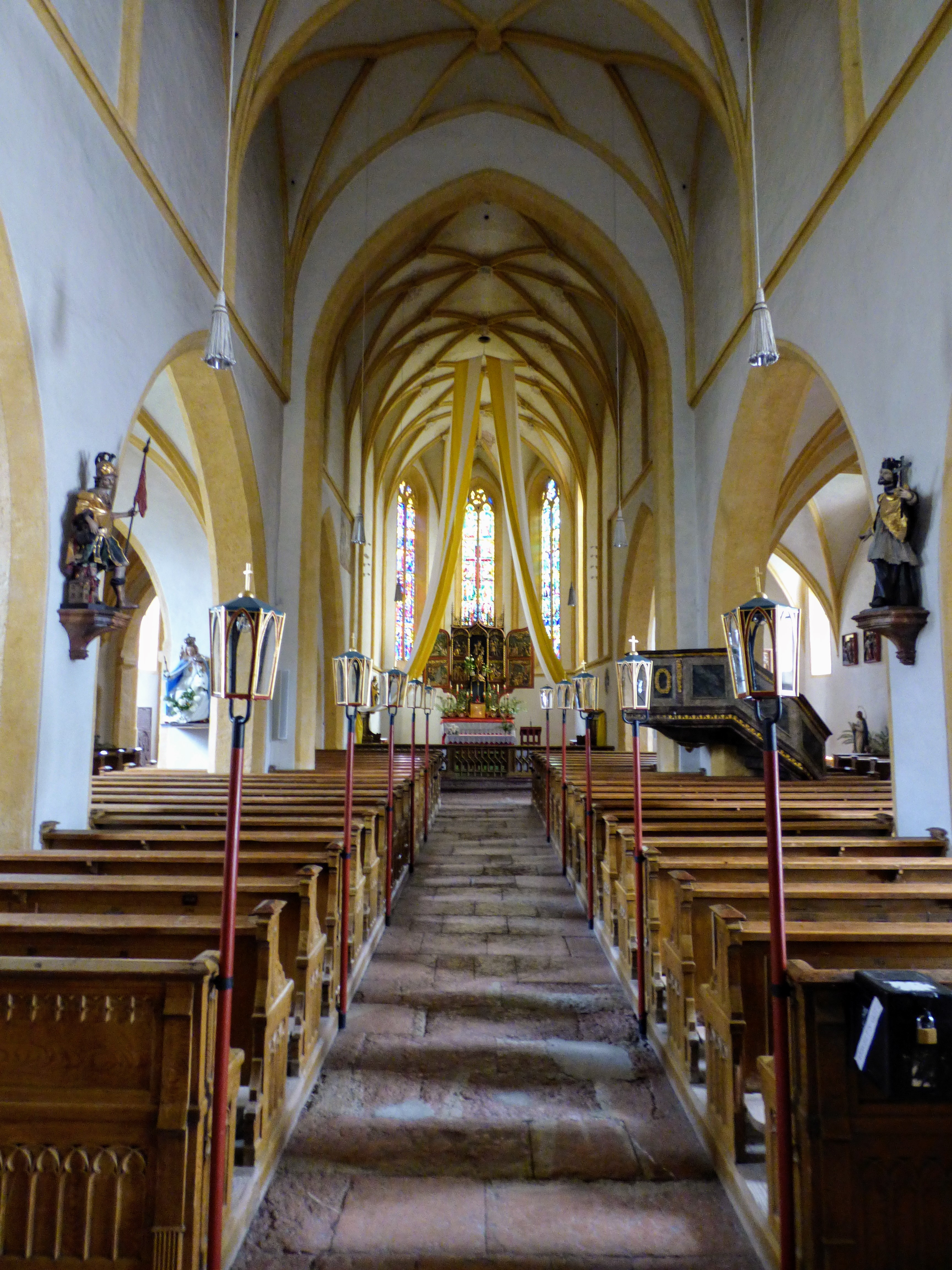 Inneres der Pfarrkirche Pfarrwerfen